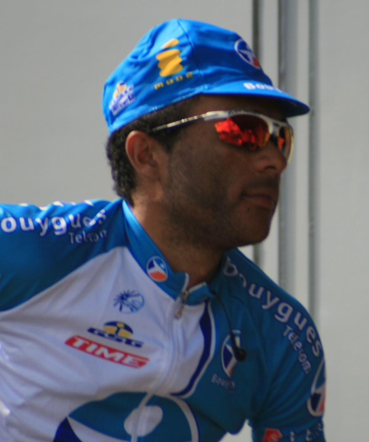 Yohann Gene, à l'Eneco Tour 2008, à Ardooie